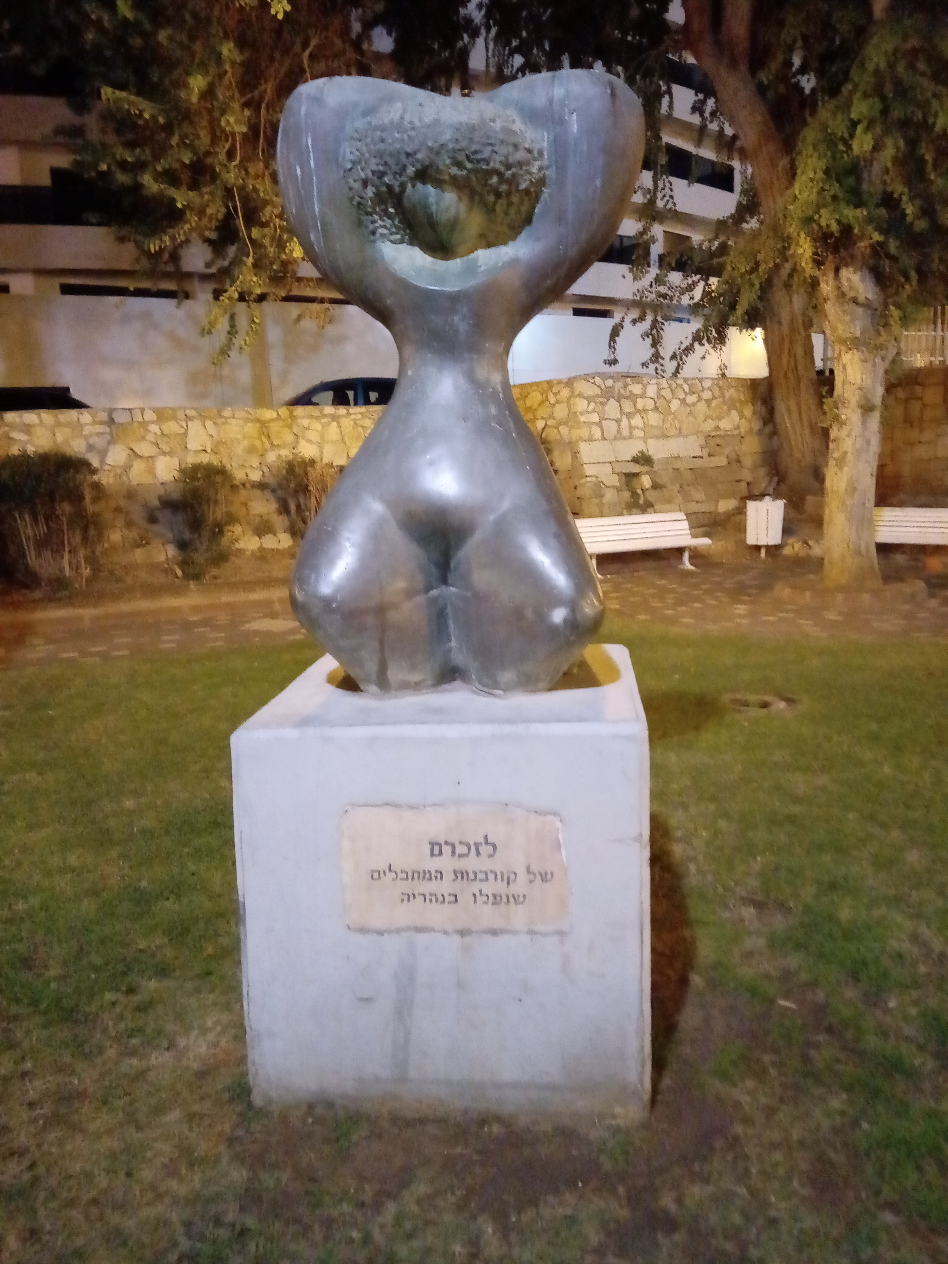 פסל לזכרם של קורבנות המחבלים בנהרייה